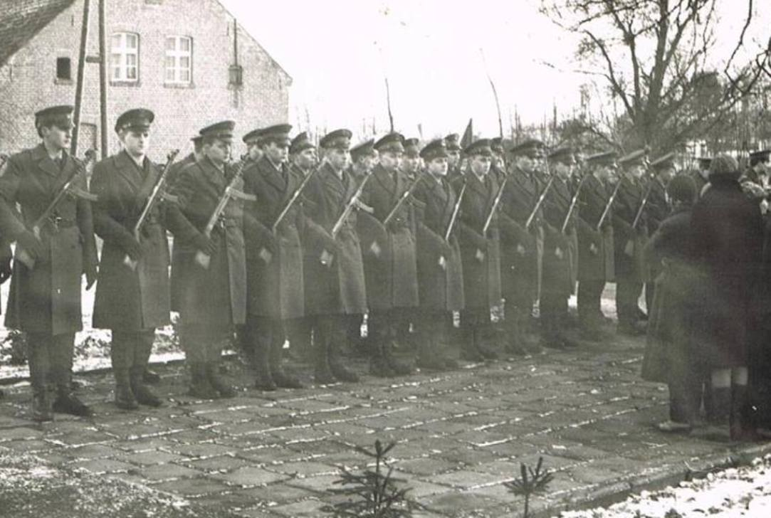 Obchody wyzwolenia Drawna